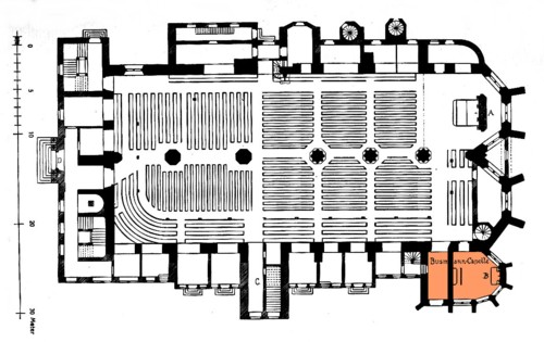 Grundriss der Sophienkirche mit eingezeichneter Busmannkapelle